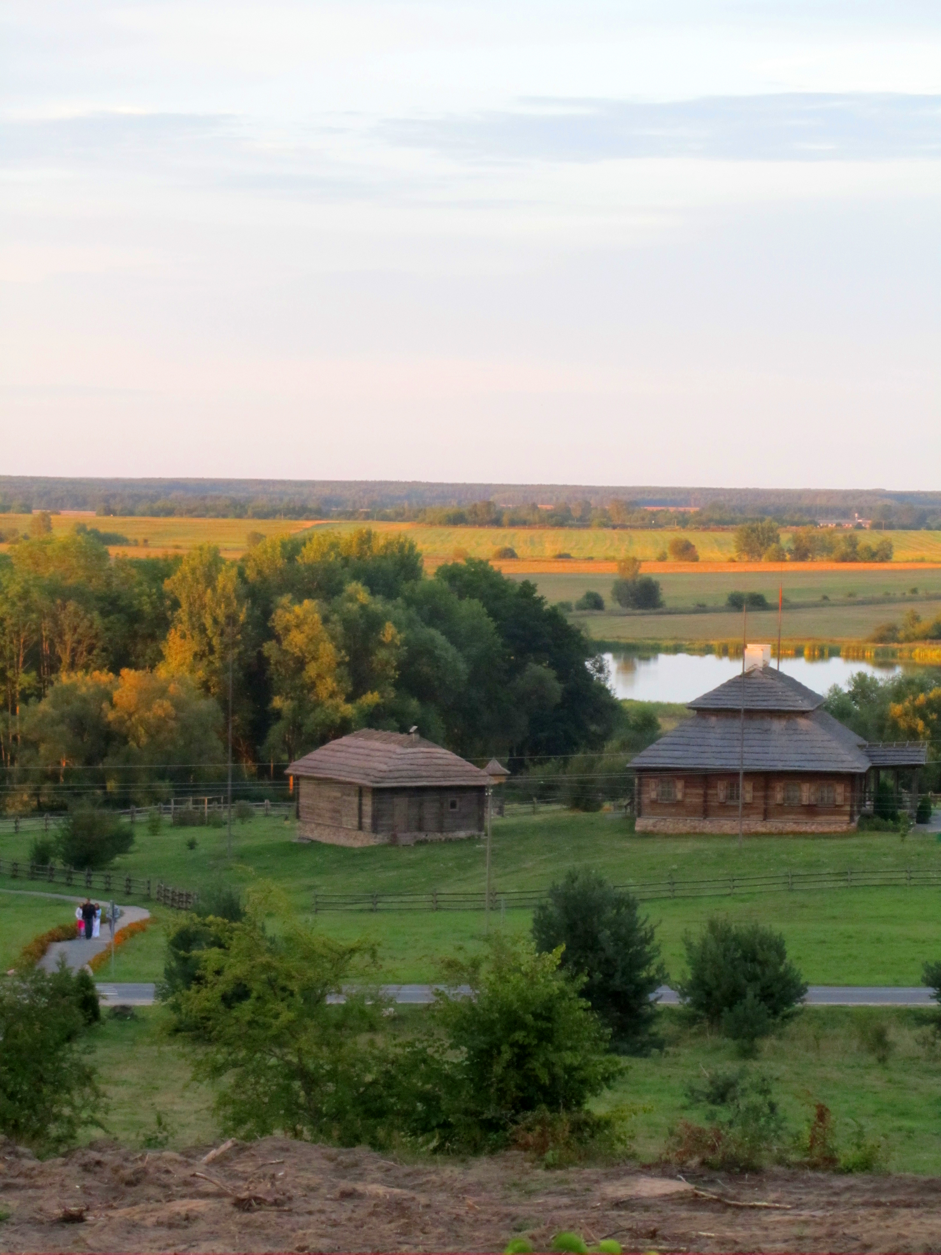 Косаўскі палацава-паркавы ансамбль: рэшткі былога палацу Пуслоўскіхмэмарыяльны музэй-сядзіба Т. Касьцюшкіфрагмэнты парку This is a photo of Belarusian heritage monument. Reference number: 111Г000305 ( WLM)